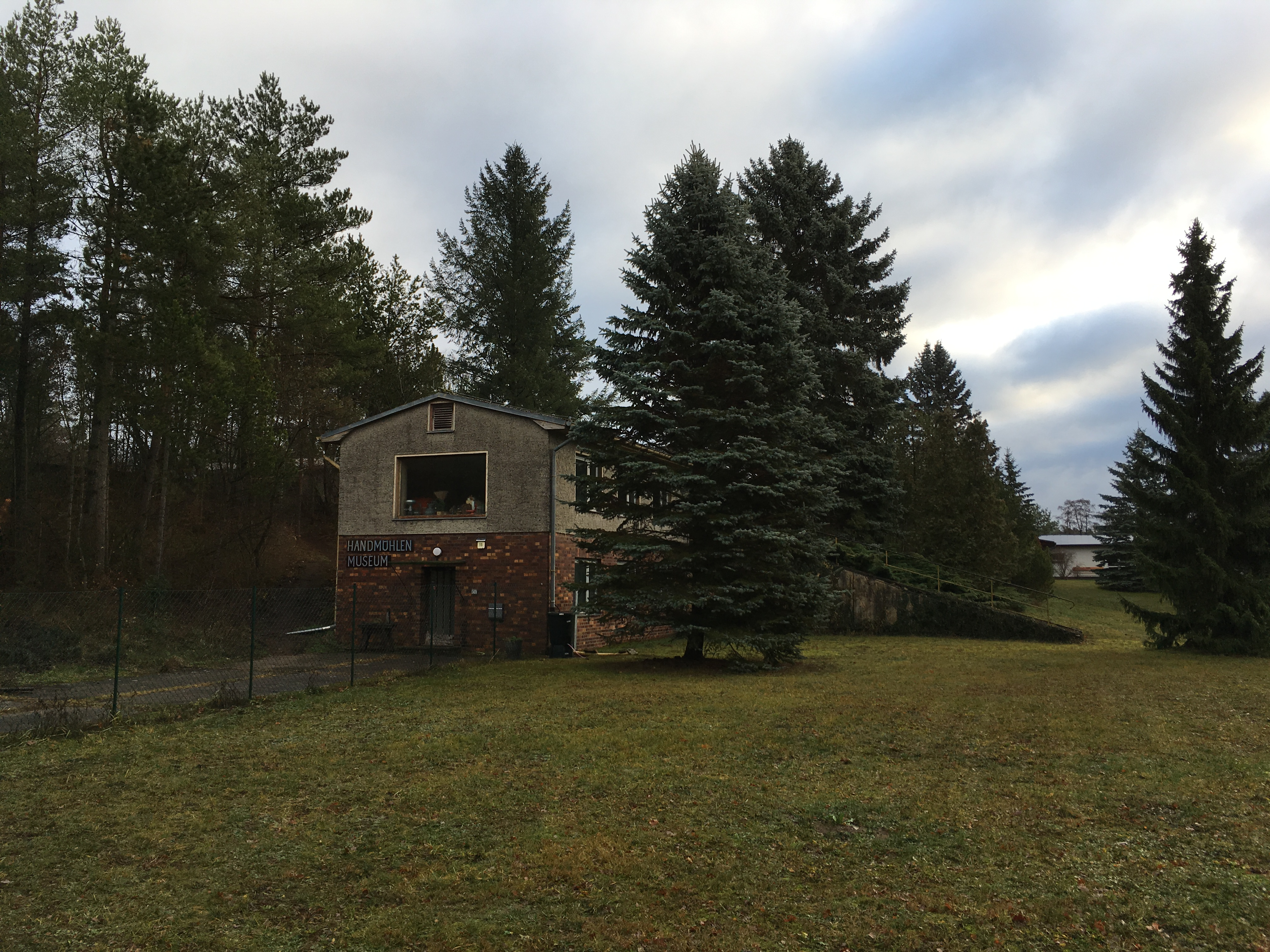 Kuhlmühle, ein Wohnplatz von Wittstock/Dosse im Landkreis Ostprignitz-Ruppin in Brandenburg